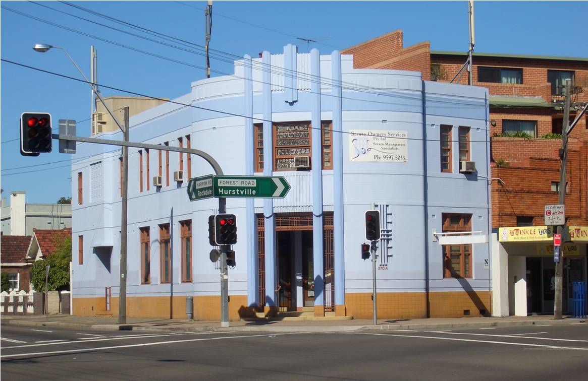 Bexley, Sydney